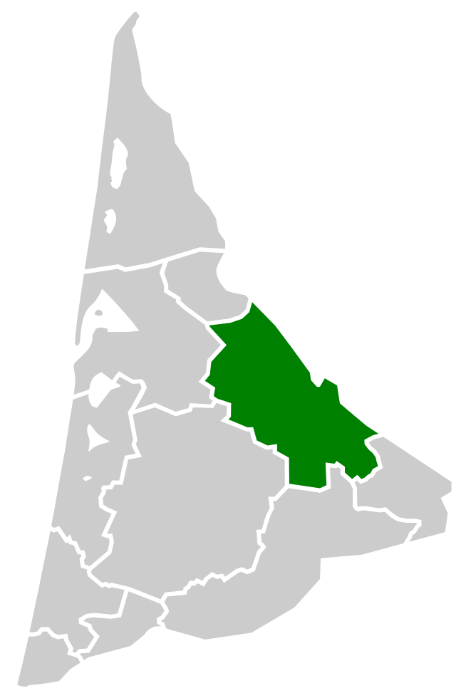 Localisation des Landes Girondines